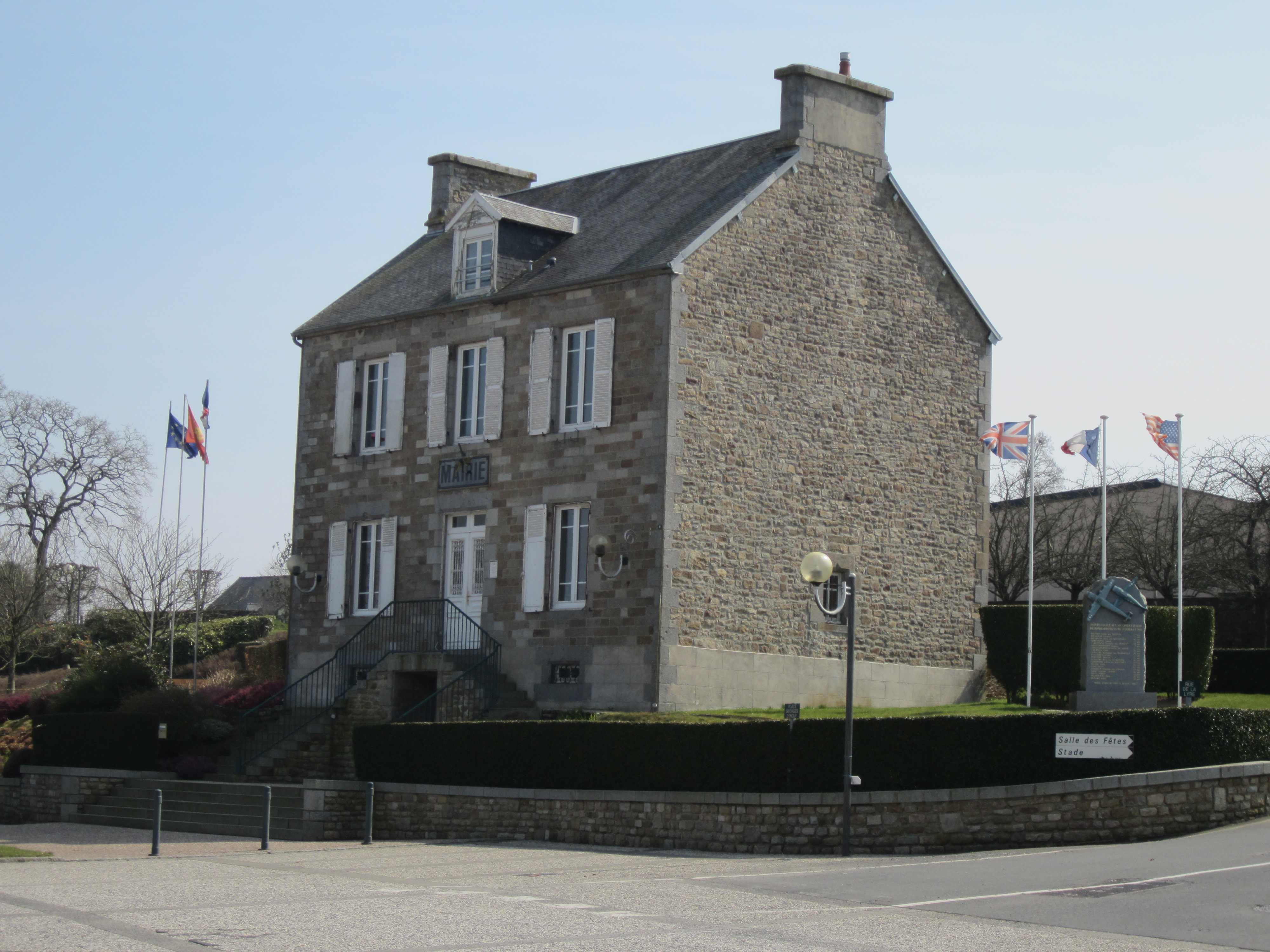 Église Sainte-Cécile de Sainte-Cécile (Manche)